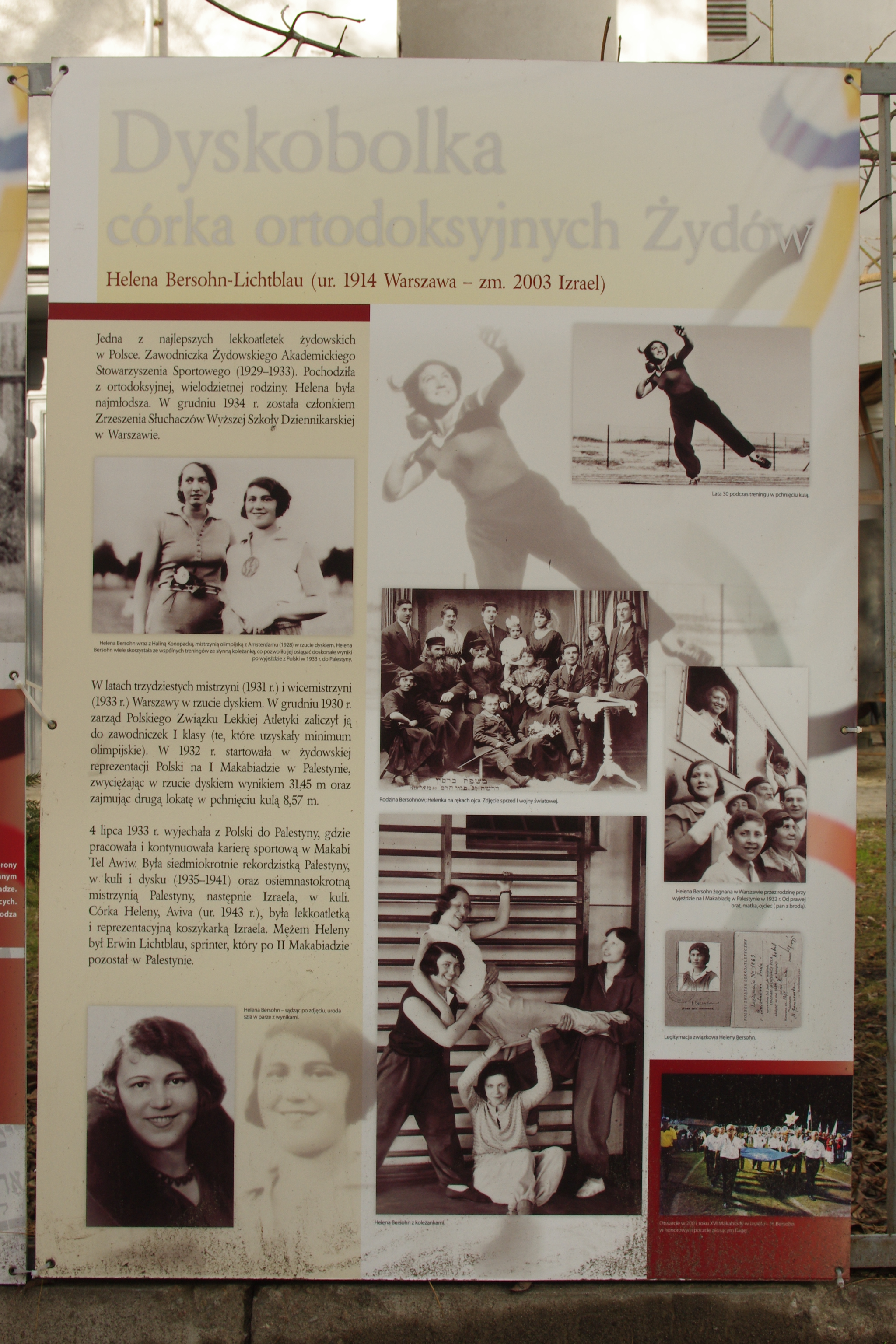 Fragment wystawy plenerowej ”Sport Żydowski w przedwojennej Warszawie” autorstwa dr Jarosława Rokickiego, przygotowanej przez Fundacje im. prof. Mojżesza Schorra, a prezentowanej na przełomie 2012/2013 r., przy ul. Twardej 6 w Warszawie. Na fotografii fragment tablicy pt."Dyskobolka - córka ortodoksyjnych żydów - Helena Bersohn-Lichtblau (ur. 1914 Warszawa - zm. 2003 Izrael)"